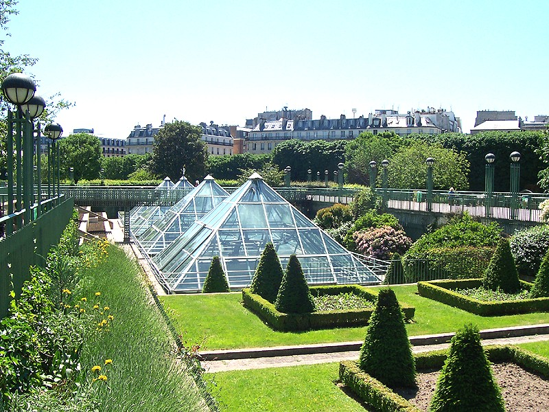 Parigi - Jardin du Forum les Halles